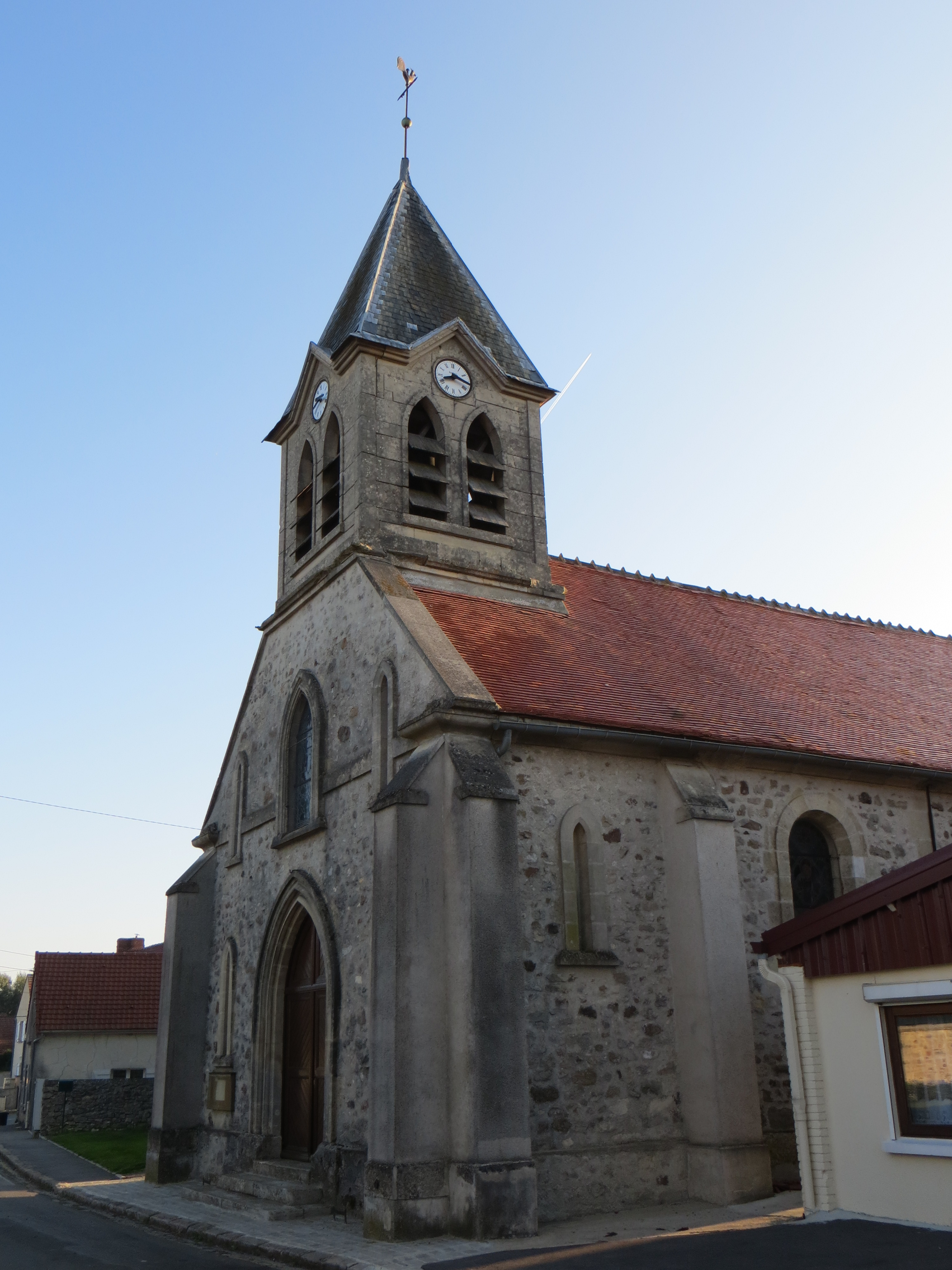 Vue de l'église